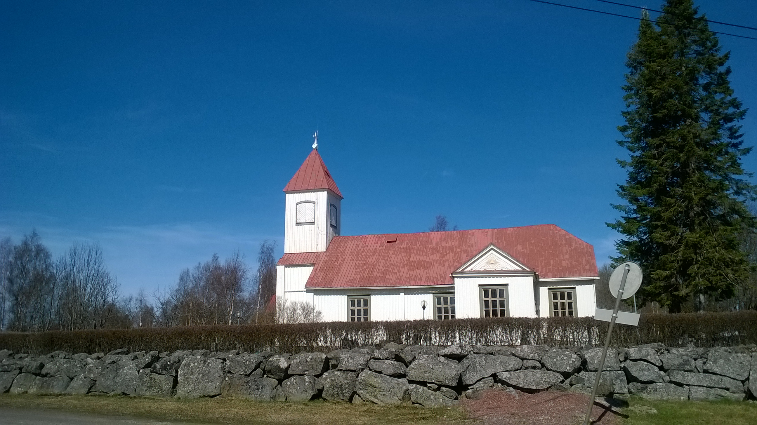 Bergön satamat ja saaristokylä; rakennettu kulttuuriympäristö Maalahdella